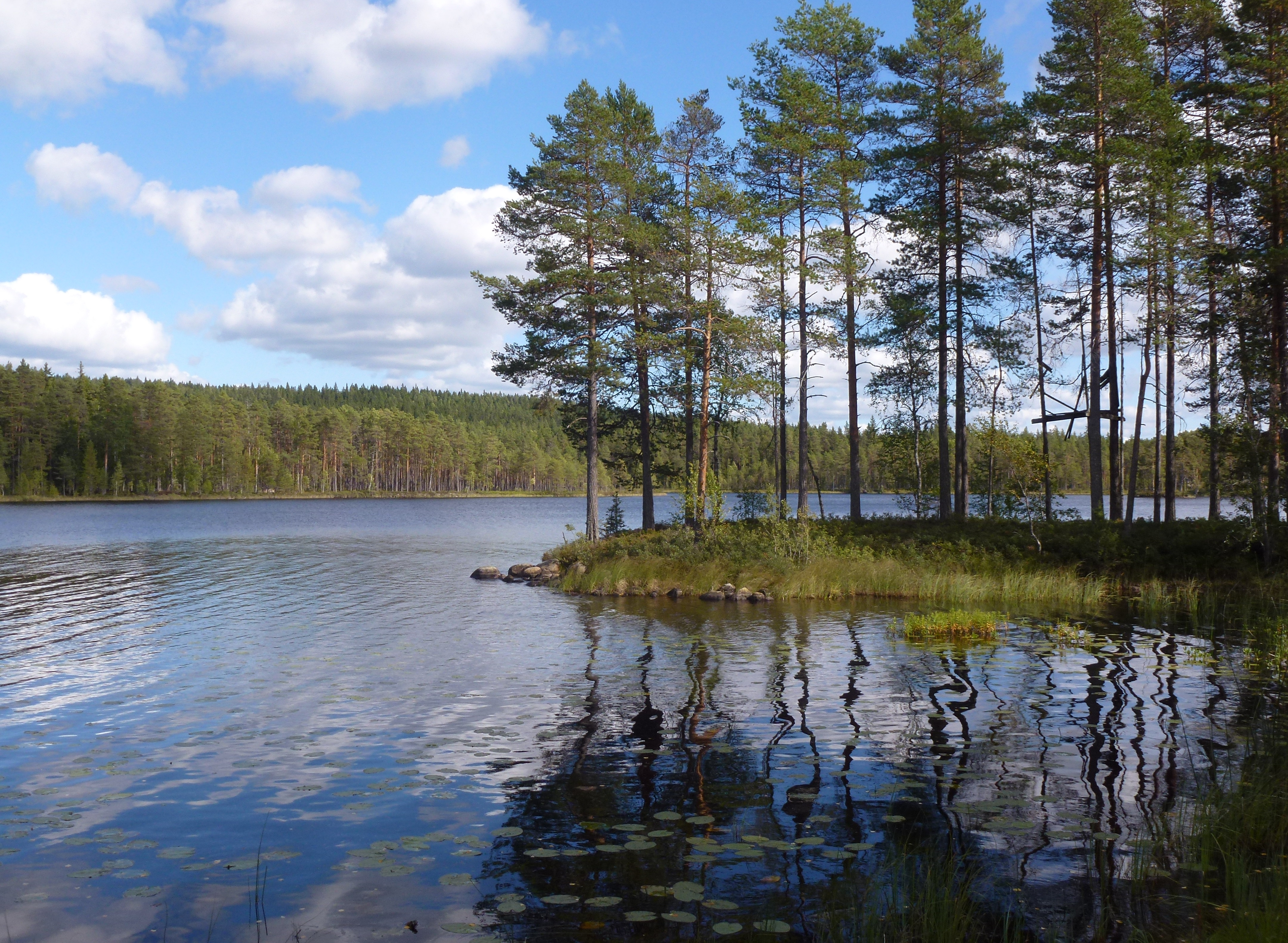 Gänsen sjö